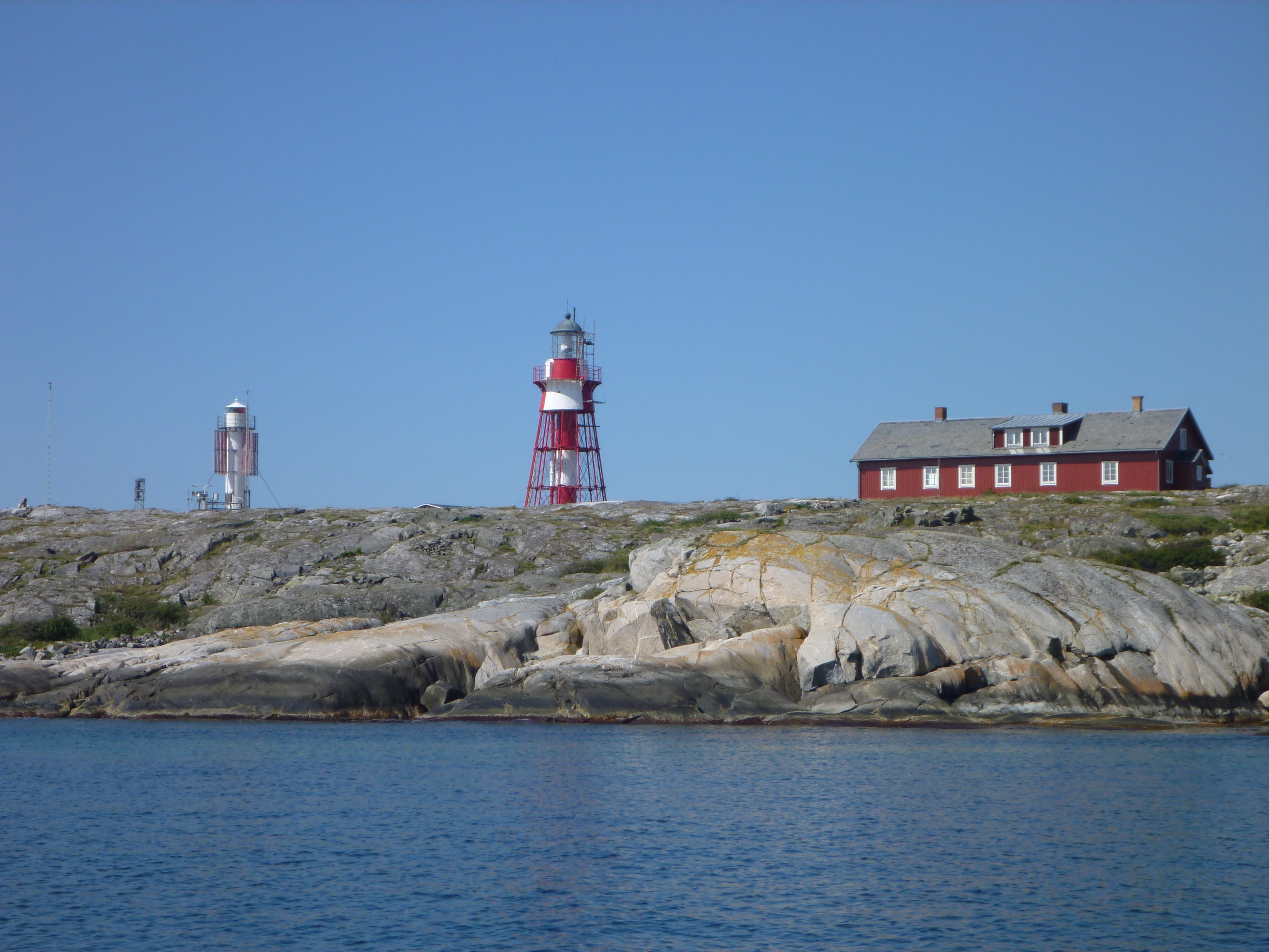 Måseskärs nya och gamla fyr